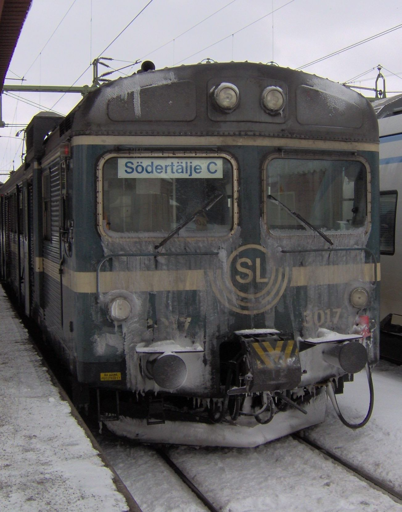 Nedisat Pendeltåg typ X1 i Södertälje Hamn Station, vintern 2005/2006. Iced down commuter train type X1 in Södertälje Hamn, winter 2005/2006.